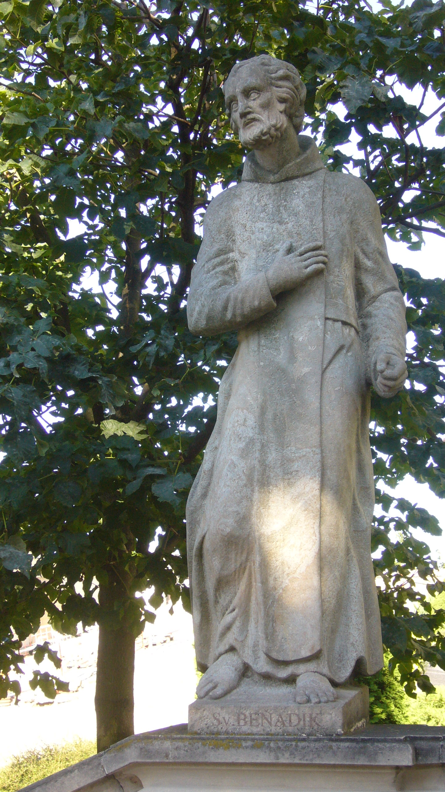 Svatý Benedikt poustevník, biskupství Nitra (SK)